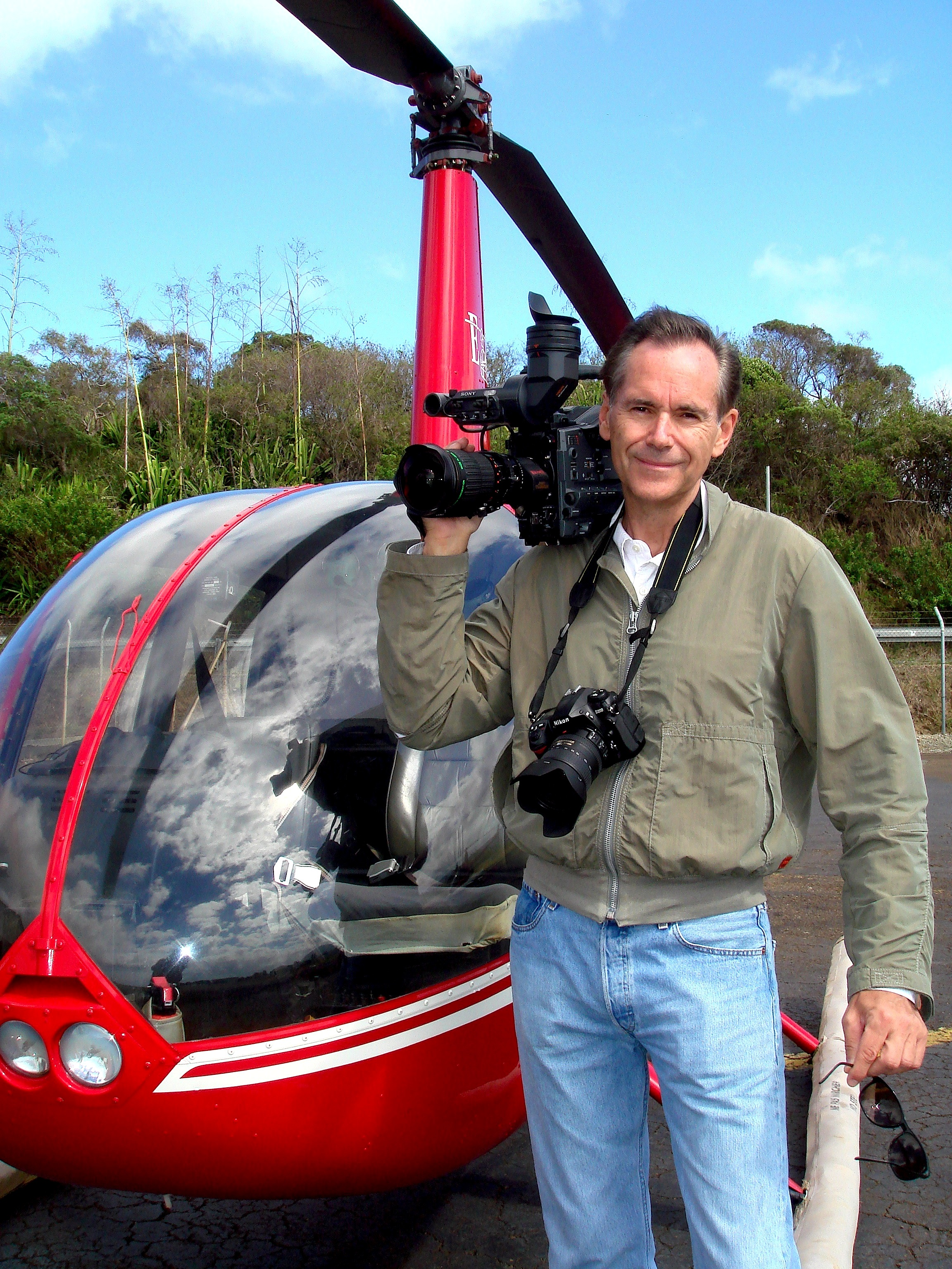 Pierre Brouwers en tournage en Nouvelle-Calédonie